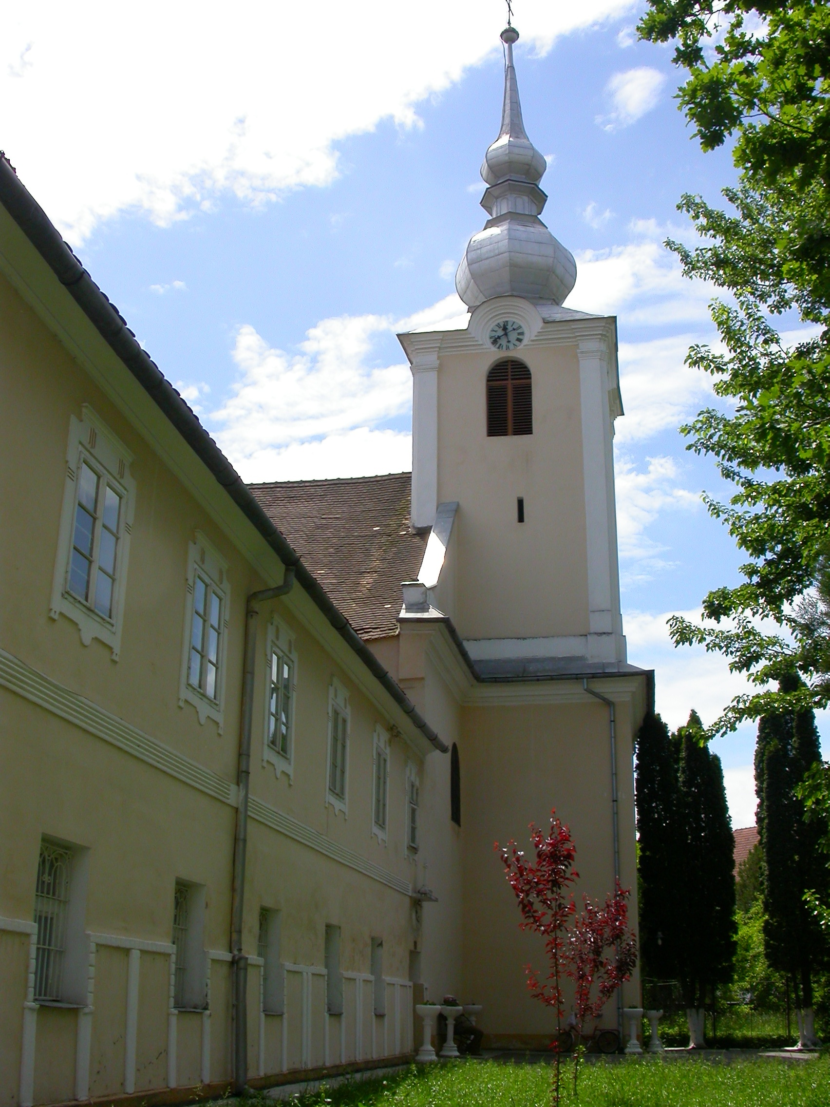 Mănăstirea franciscană, 1721